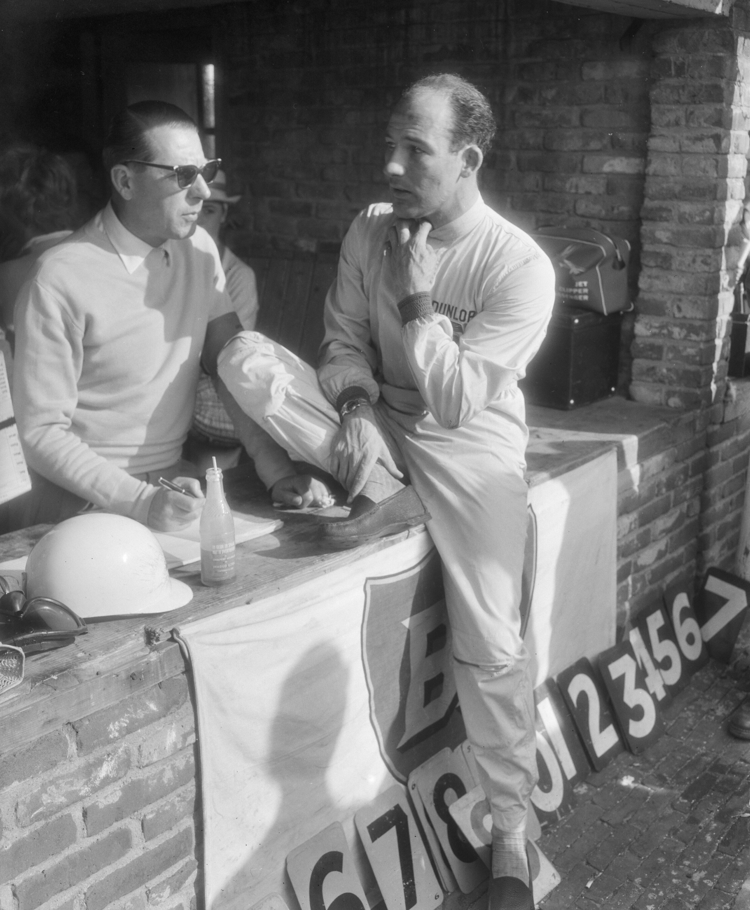 Collectie / Archief : Fotocollectie Anefo Reportage / Serie : Grand Prix Zandvoort 1959 Beschrijving : Autoraces op het circuit van Zandvoort van de Grand Prix Stirling Moss, nadat hij uitgevallen is Datum : 31 mei 1959 Locatie : Noord-Holland, Zandvoort Persoonsnaam : Moss, Stirling Fotograaf : Pot, Harry / Anefo Auteursrechthebbende : Nationaal Archief Materiaalsoort : Negatief (zwart/wit) Nummer archiefinventaris : bekijk toegang 2.24.01.04 Bestanddeelnummer : 910-4126